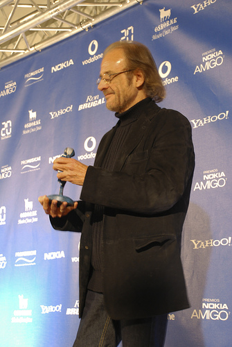 Premios Nokia Amigo 2007, El Informador Digital.